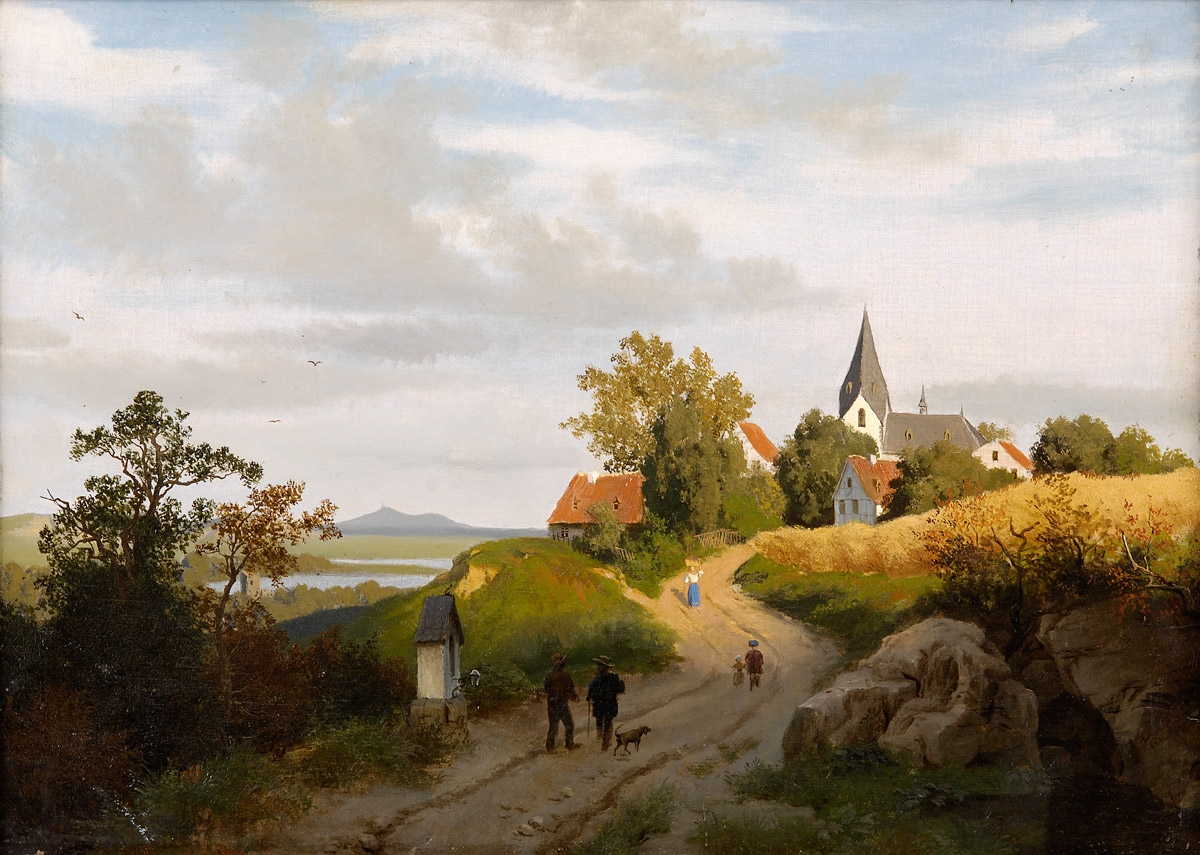 Rheinische Dorfansicht im Sommer. Signiert. Öl auf Leinwand, 47 x 65 cm